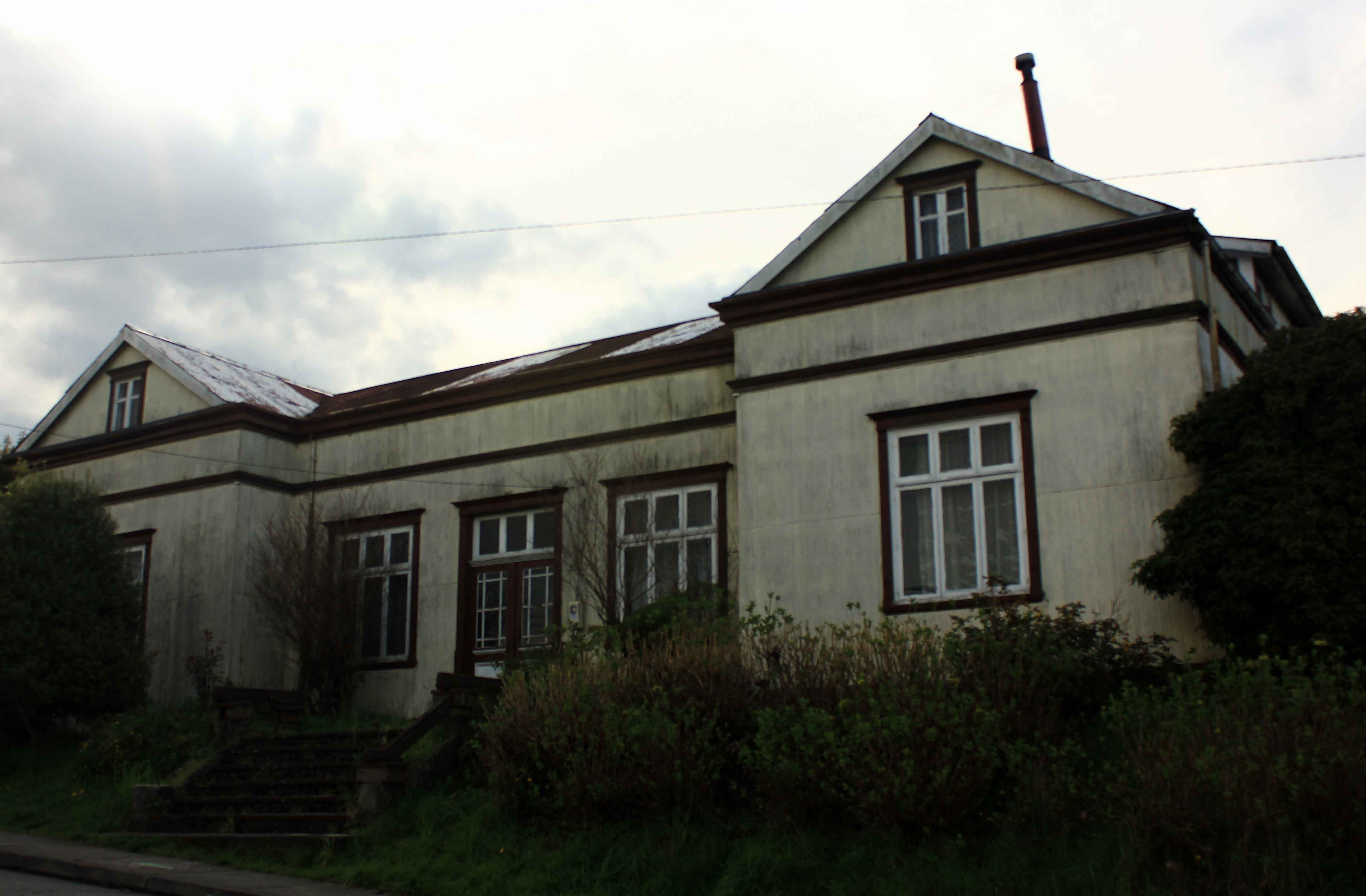 Casona Alemana, Puerto Varas This is a photo of a national monument in Chile: 724